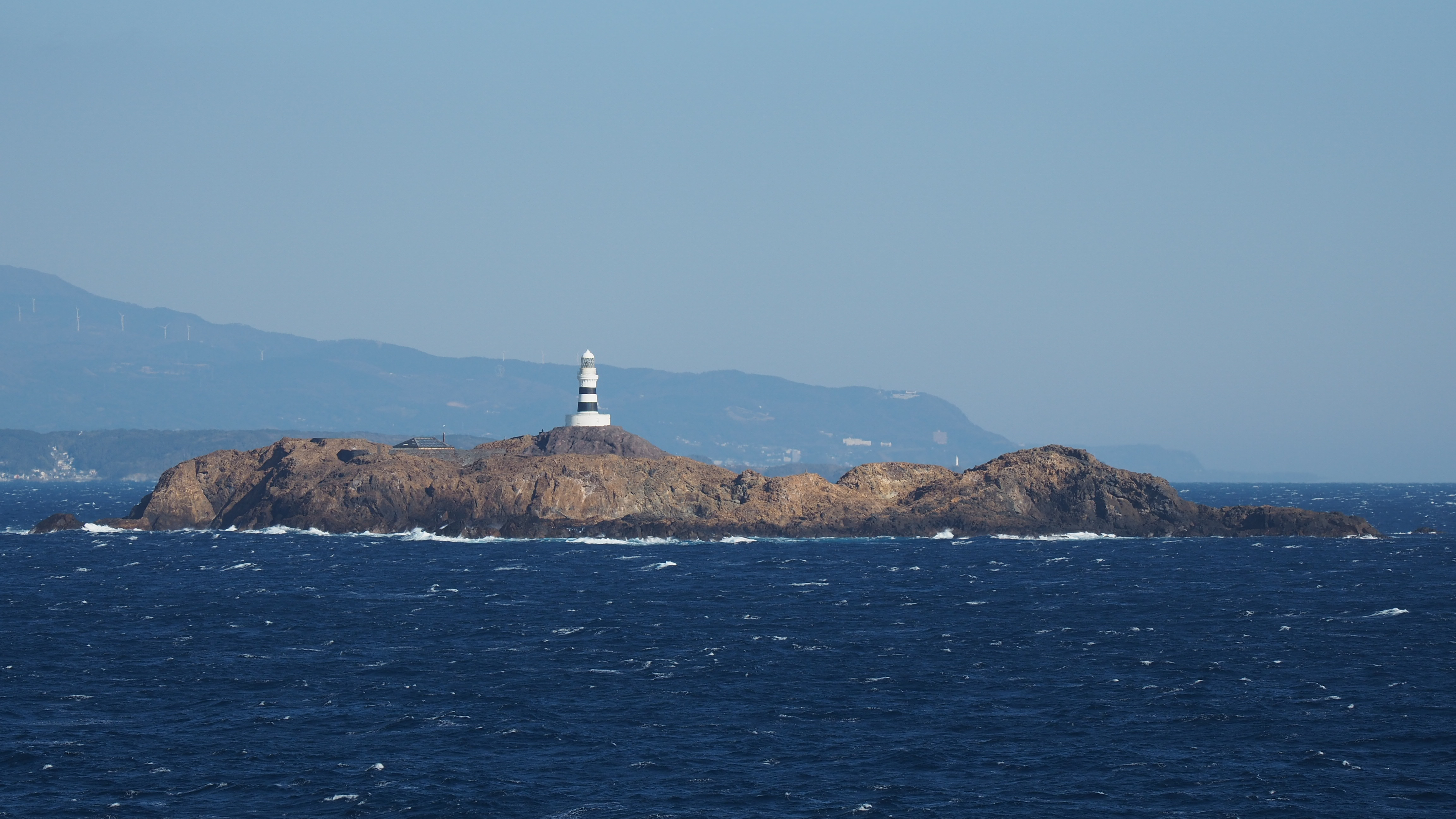 神子元島（南方より望む。2020年1月）